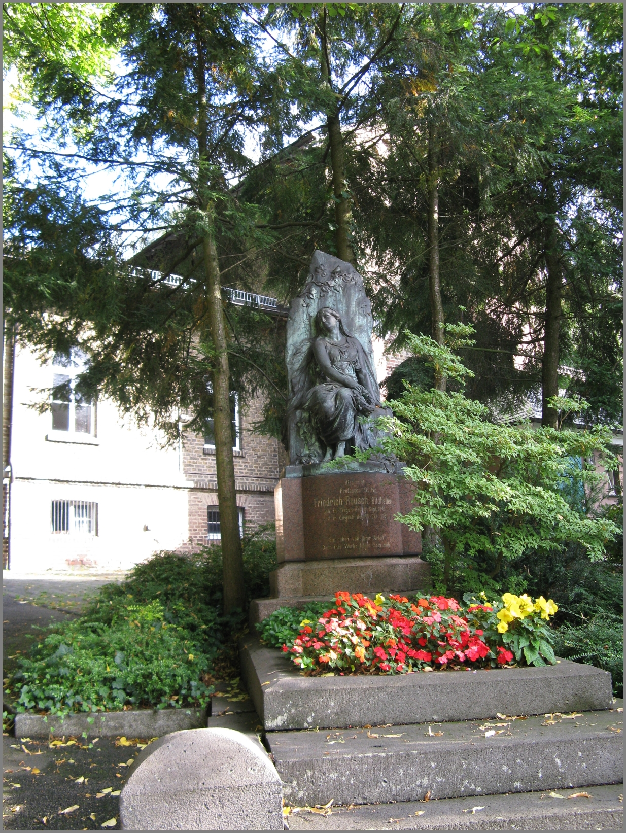 Grabmal von Prof. Friedrich Reusch auf dem Lindenbergfriedhof seines Geburtsortes Siegen